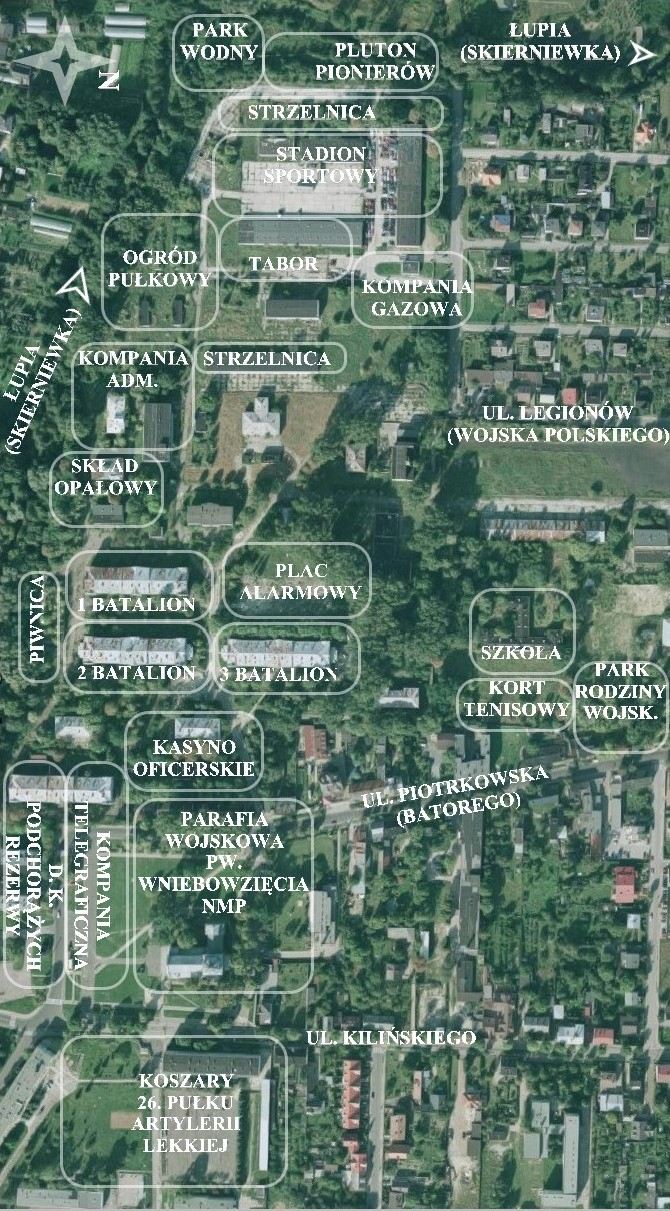 Rozmieszczenie pododdziałów 18 pułku piechoty w koszarach przy ul. Batorego w Skierniewicach w 1935 r.